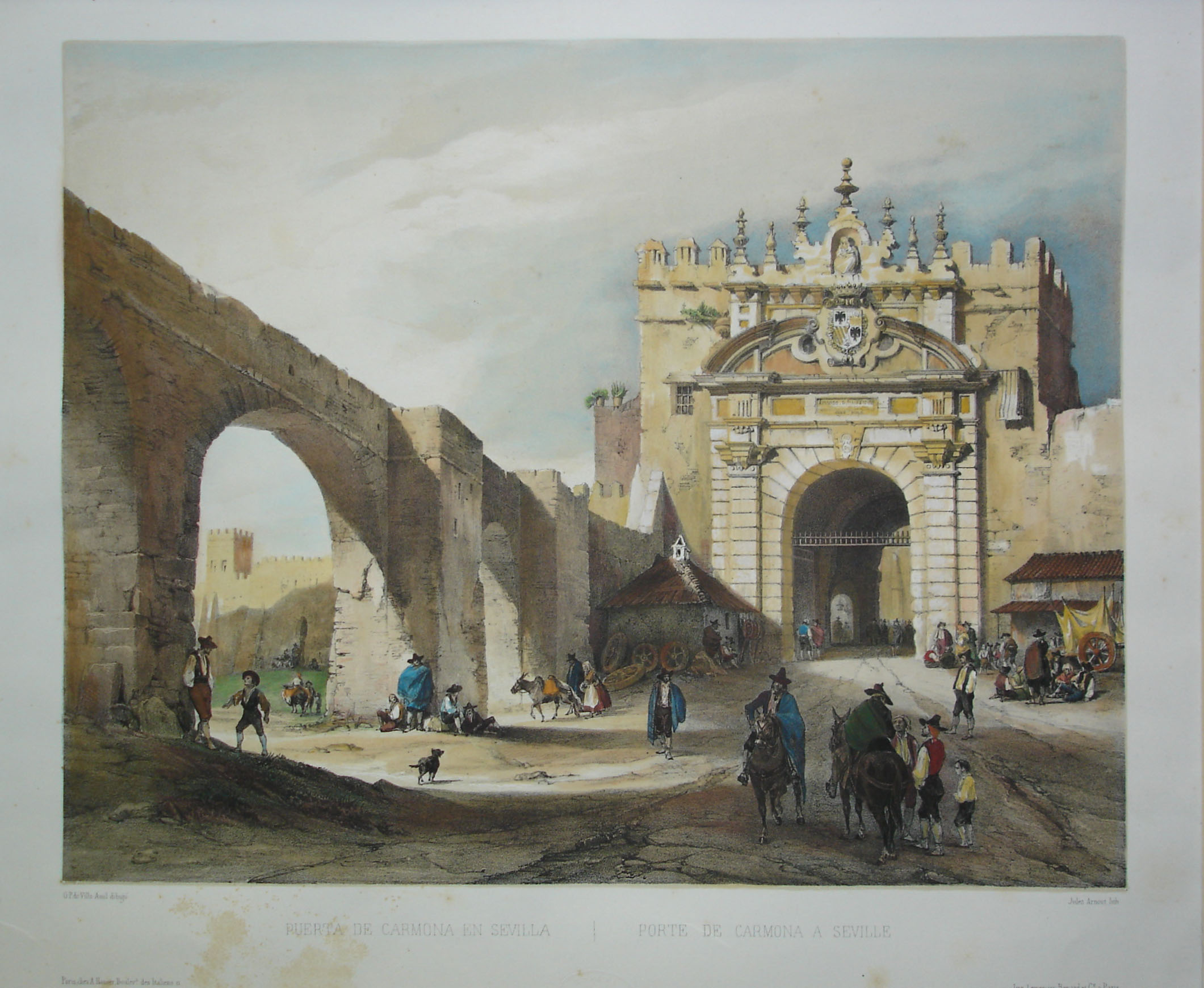 Puerta de Carmona en Sevilla. Litografía coloreada. De España artística y monumental, tomo II. 1844.